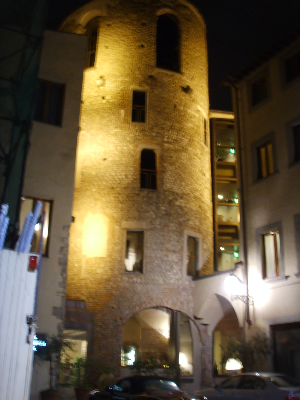 Torre della Pagliazza by night in Florence Italy